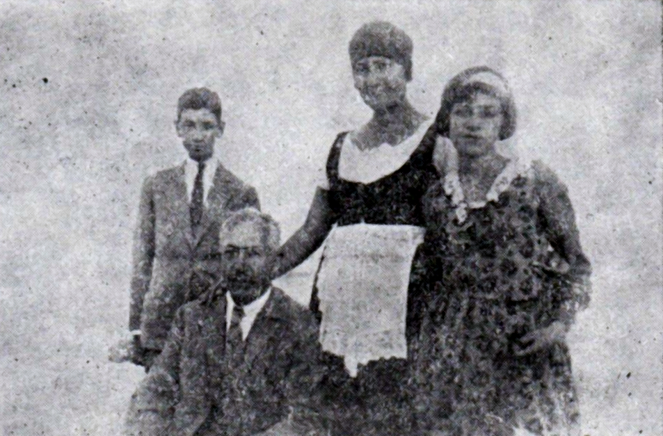 Gheorghe Petrașcu împreună cu soția și copii